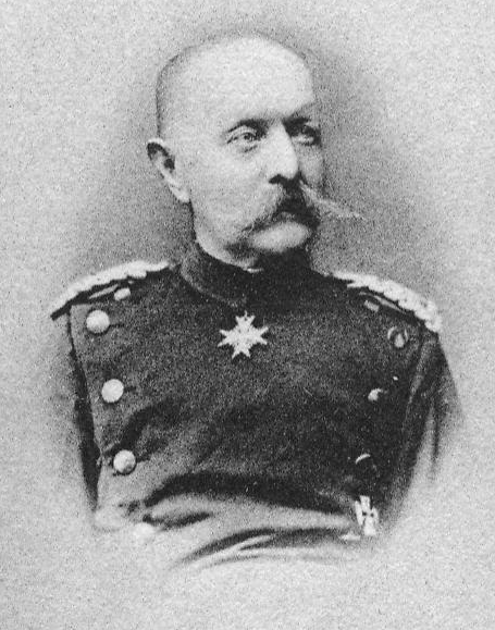 Kommandeur Ulanen-Regiment "Großherzog Friedrich von Baden" (Rheinisches) Nr. 7